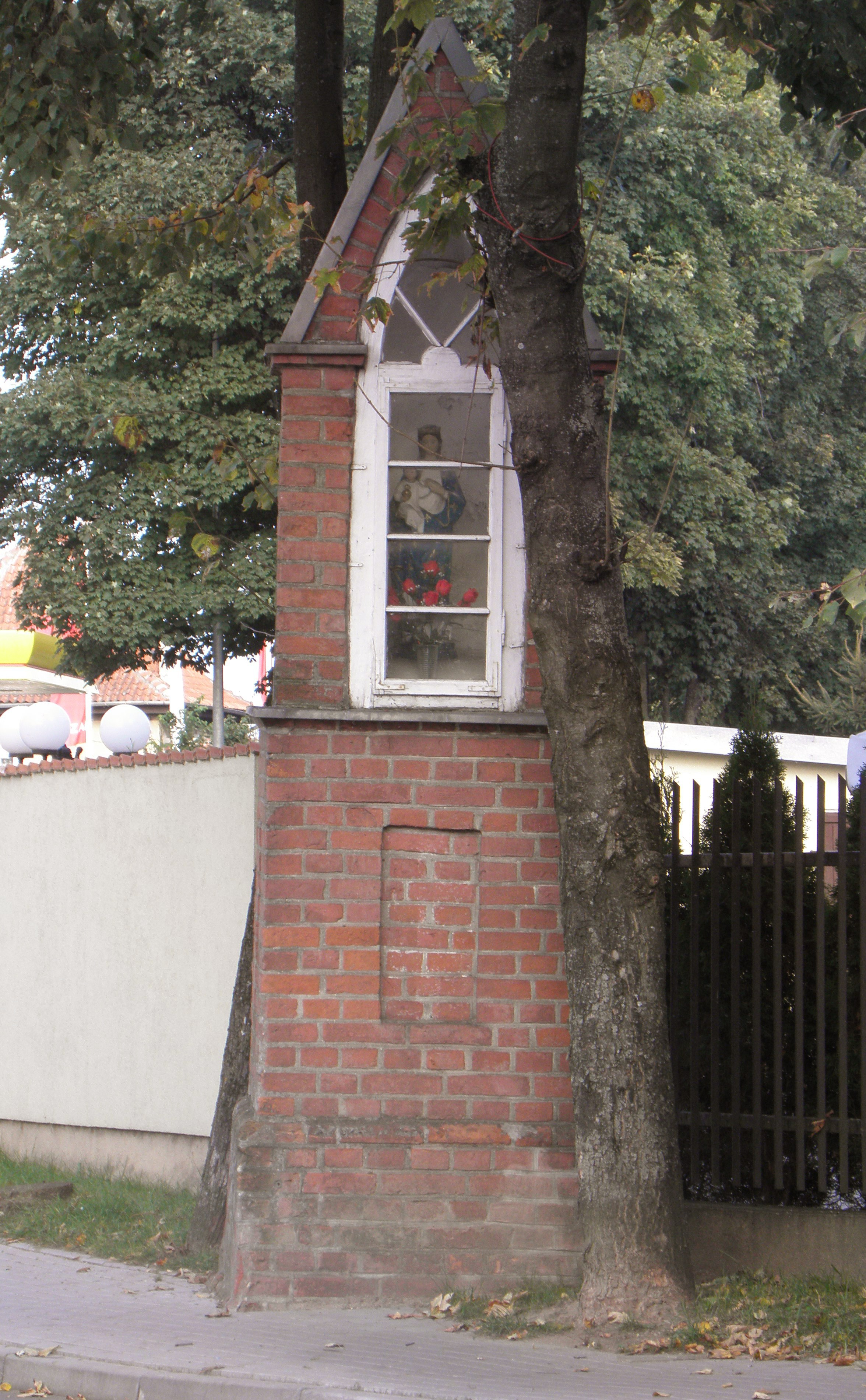 Kapliczka przydrożna przy ulicy Słowackiego. Gmina Biskupiec, powiat olsztyński.